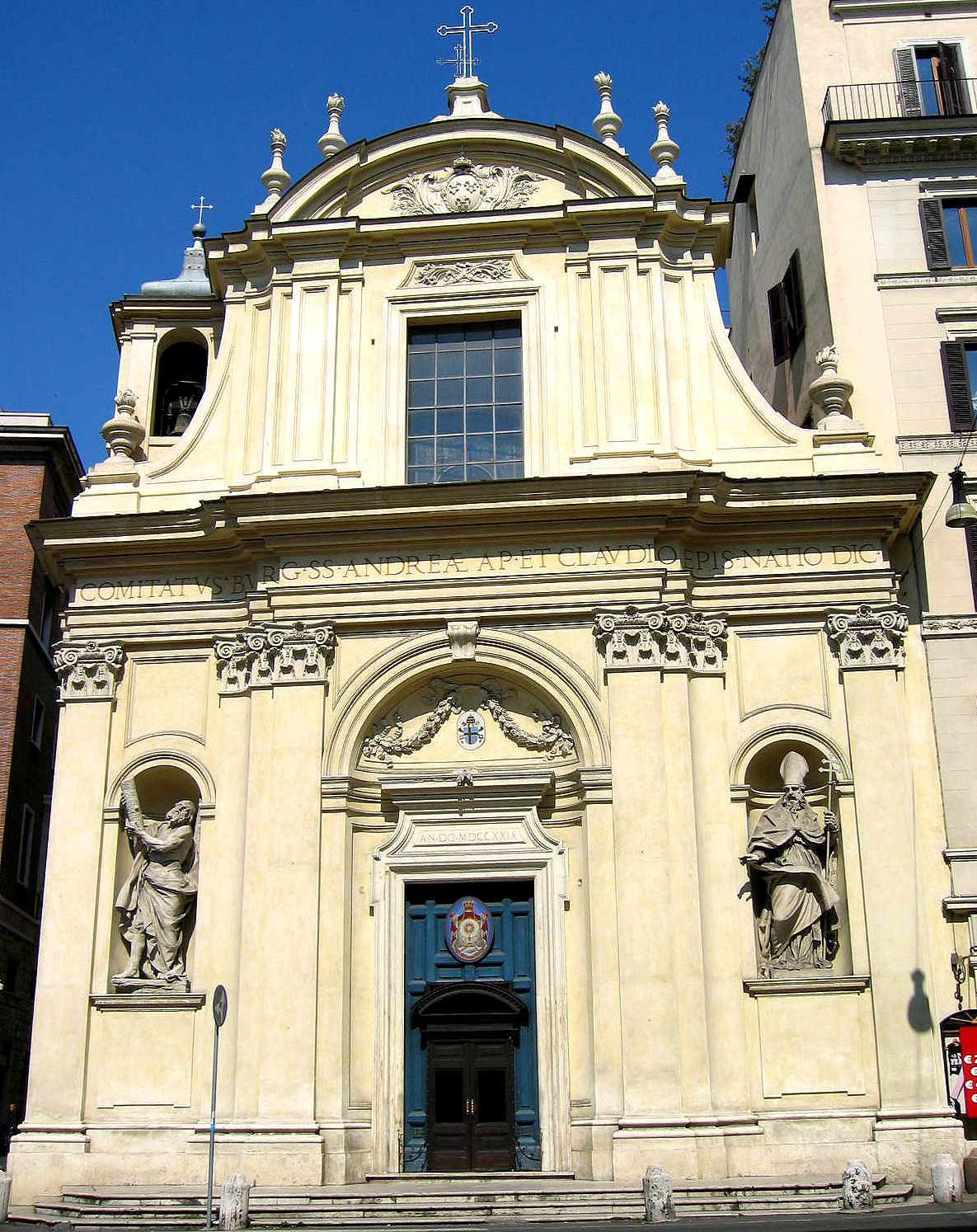 Chiesa dei Santi Andrea e Claudio dei Borgognoni. Piazza di San Claudio, Roma. Picture by Torvindus.